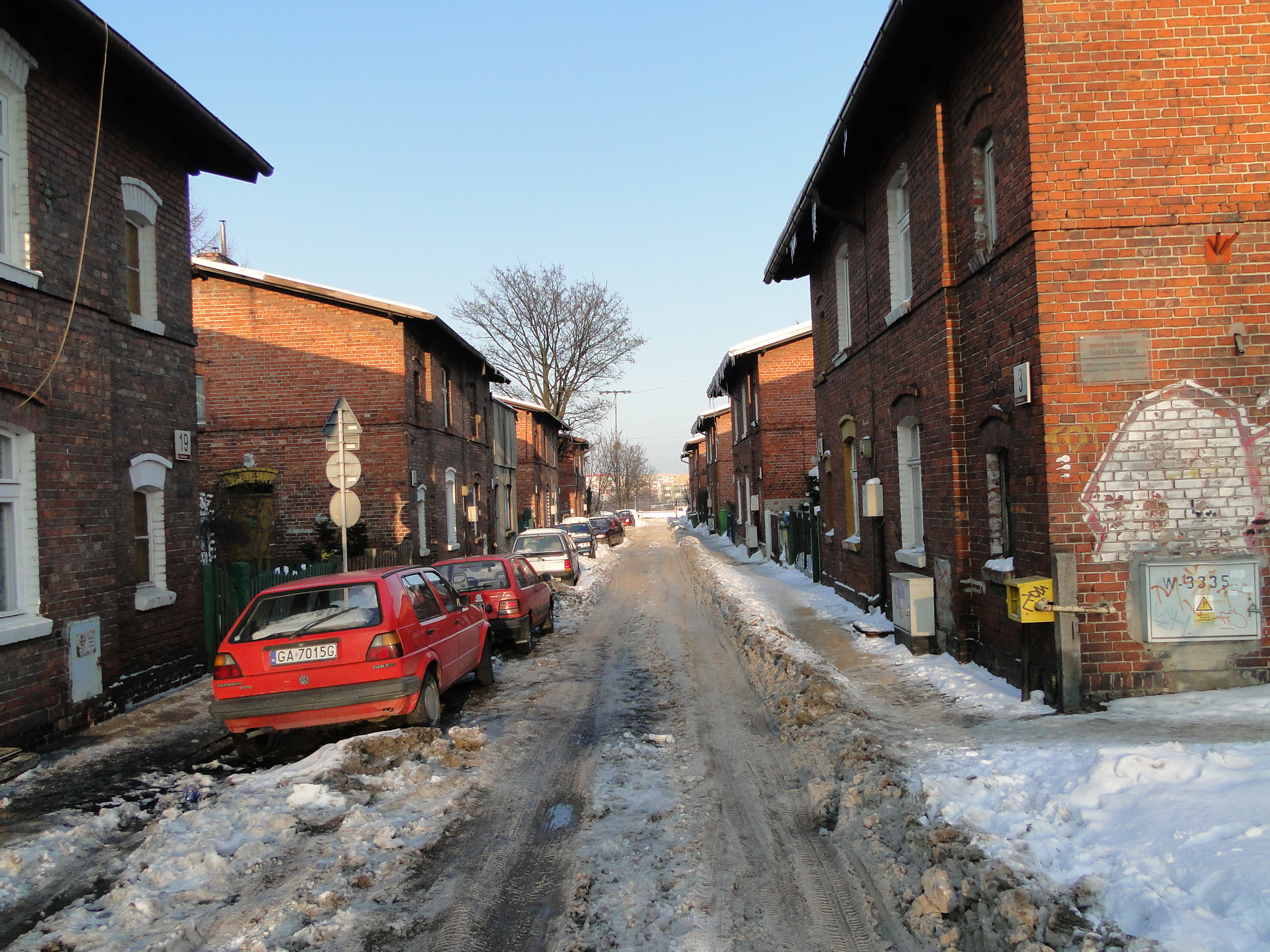 Gdańsk Wrzeszcz, ul. Miedziana.